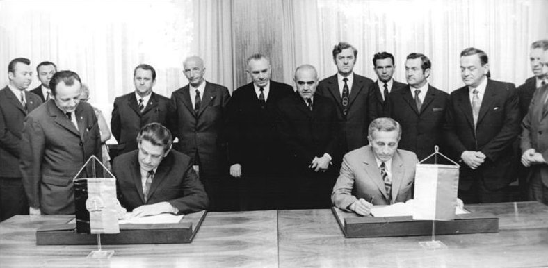 ADN-ZB Kutscher 29.6.72 Berlin:Protokoll zwischen der DDR und der VR Polen unterzeichnet-Am 29.6.72 wurde das Protokoll über die weitere Entwicklung der Zusammenarbeit auf dem Gebiet des Umweltschutzes zwischen der DDR und der VR Polen unterzeichnet.Für die DDR unterzeichnete der Stellvertreter des Vorsitzenden des Ministerrates der DDR und Minister für Umweltschutz und Wasserwirtschaft, Dr. Hans Reichelt (l.) .Für die VR Polen:der Stellvertreter des Vorsitzenden des Ministerrates der Volksrepublik Zdzialaw Tomal (r.)